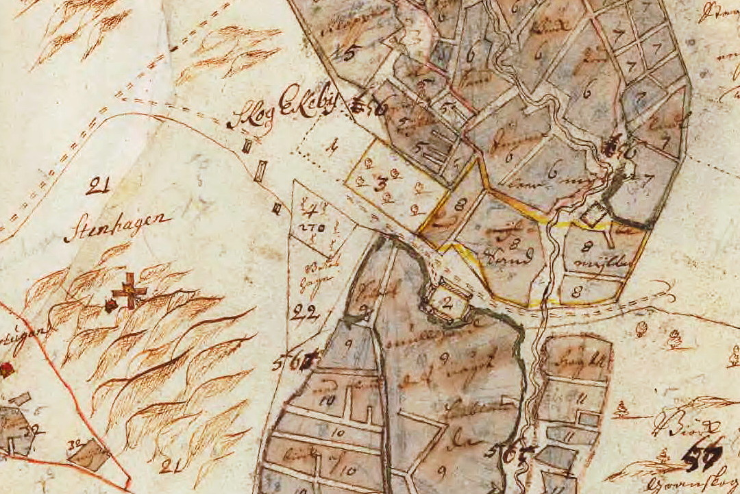 Del av Skogs-Ekeby ägor visande gamla gårdens läge.